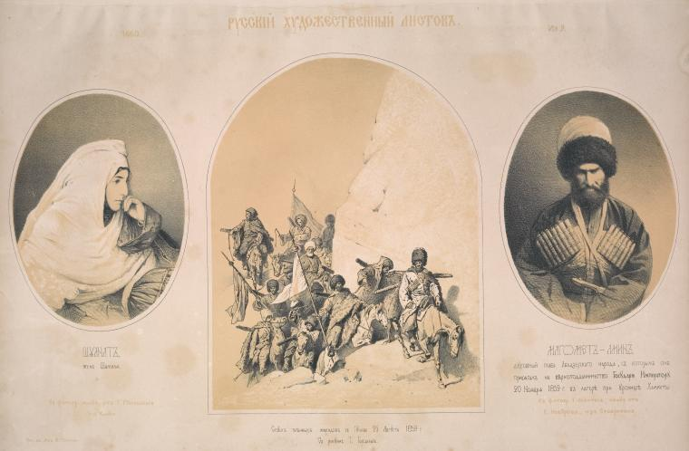 Shuanat, zhena Shamilia; Magomet-amin; Spusk plennykh miuridov s Guniba.